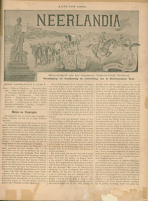 Voorpagina van het blad "Neerlandia", Maandschrift van het Algemeen Nederlandsch Verbond, jaargang 2, januari 1898 (Gent)